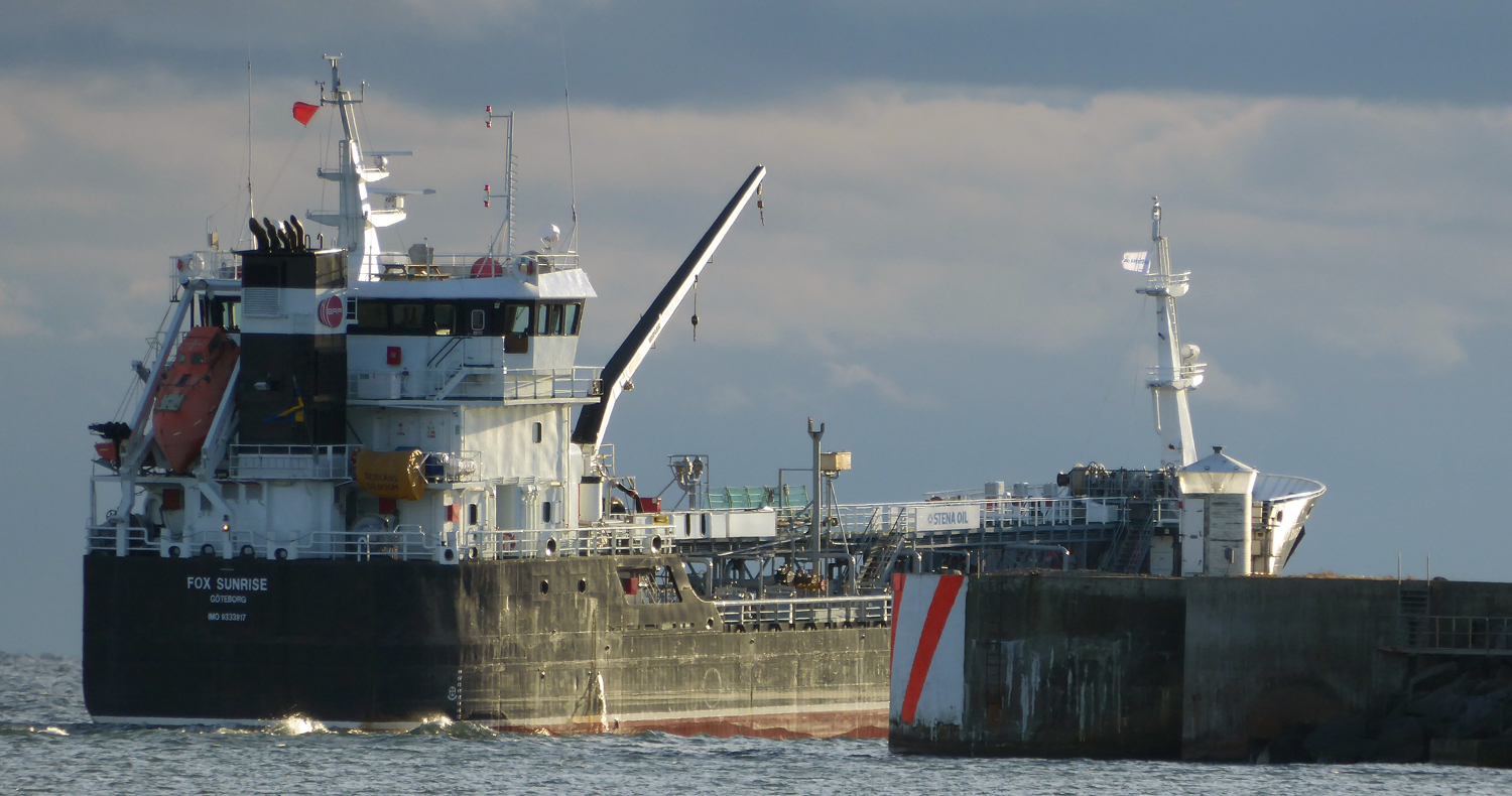 Fox Sunrise lämnar Ystad 2 nov 2016.